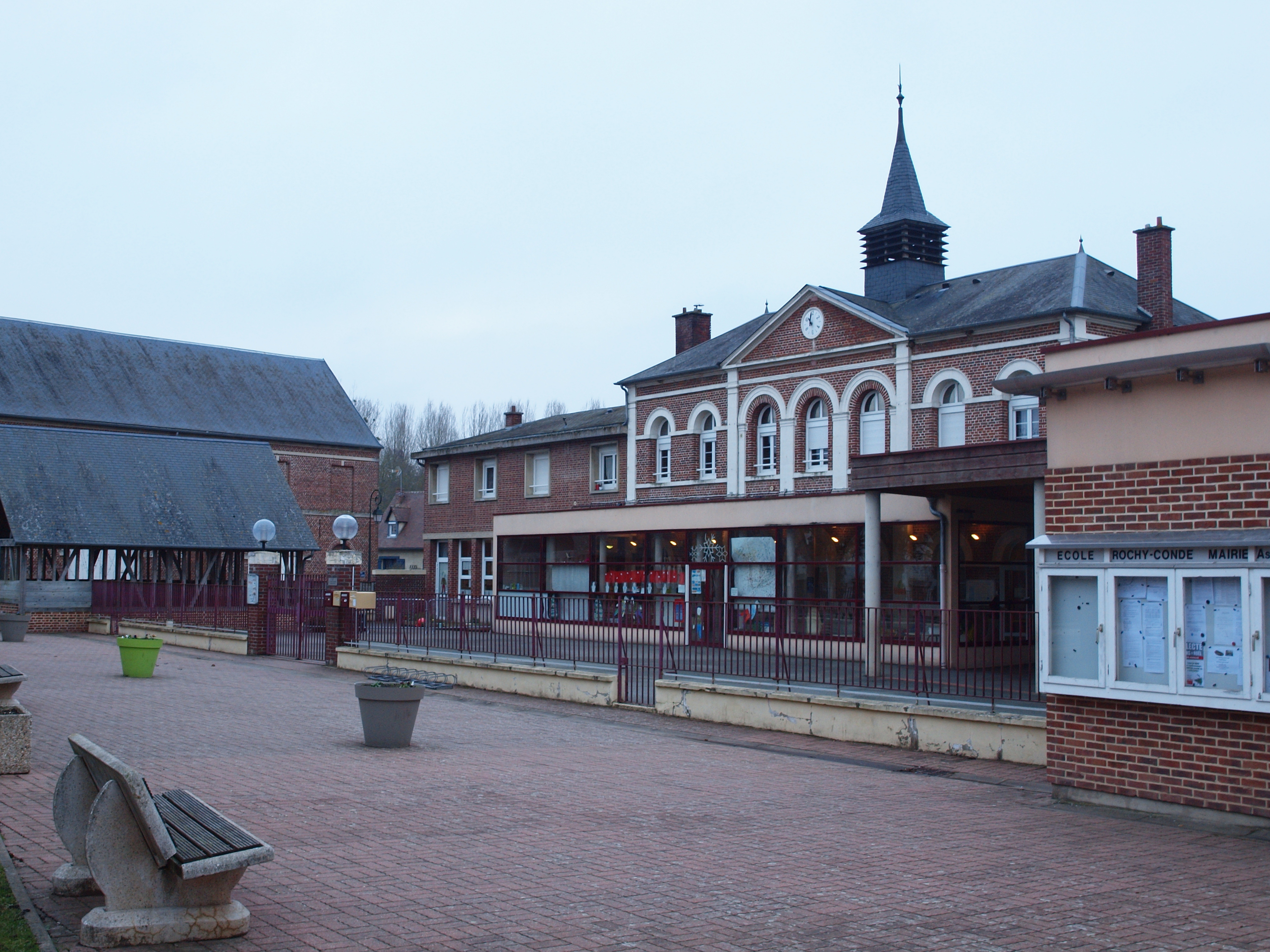 École de Rochy-Condé (Oise, France)